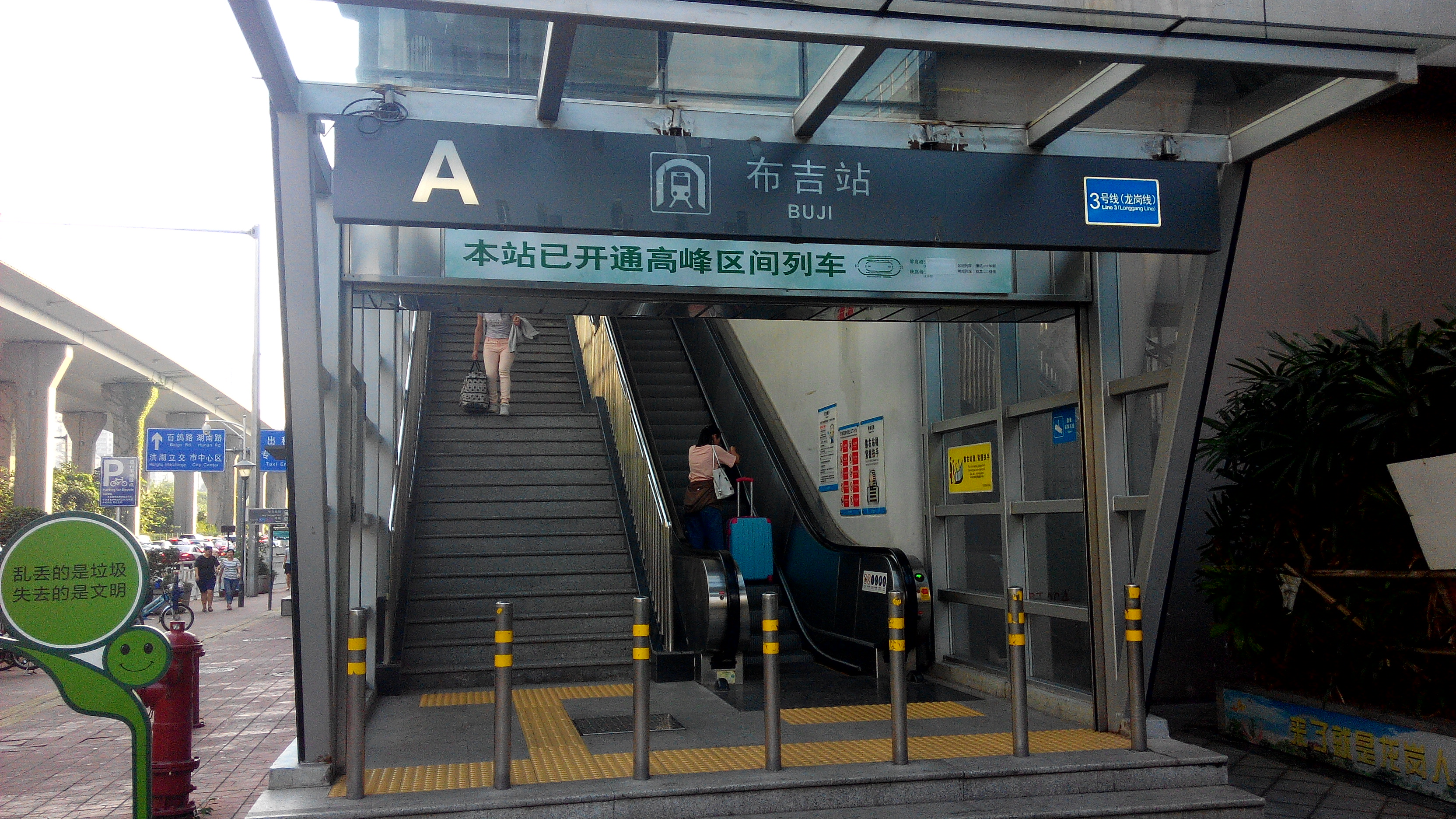 深圳地铁三号线 布吉站A出口